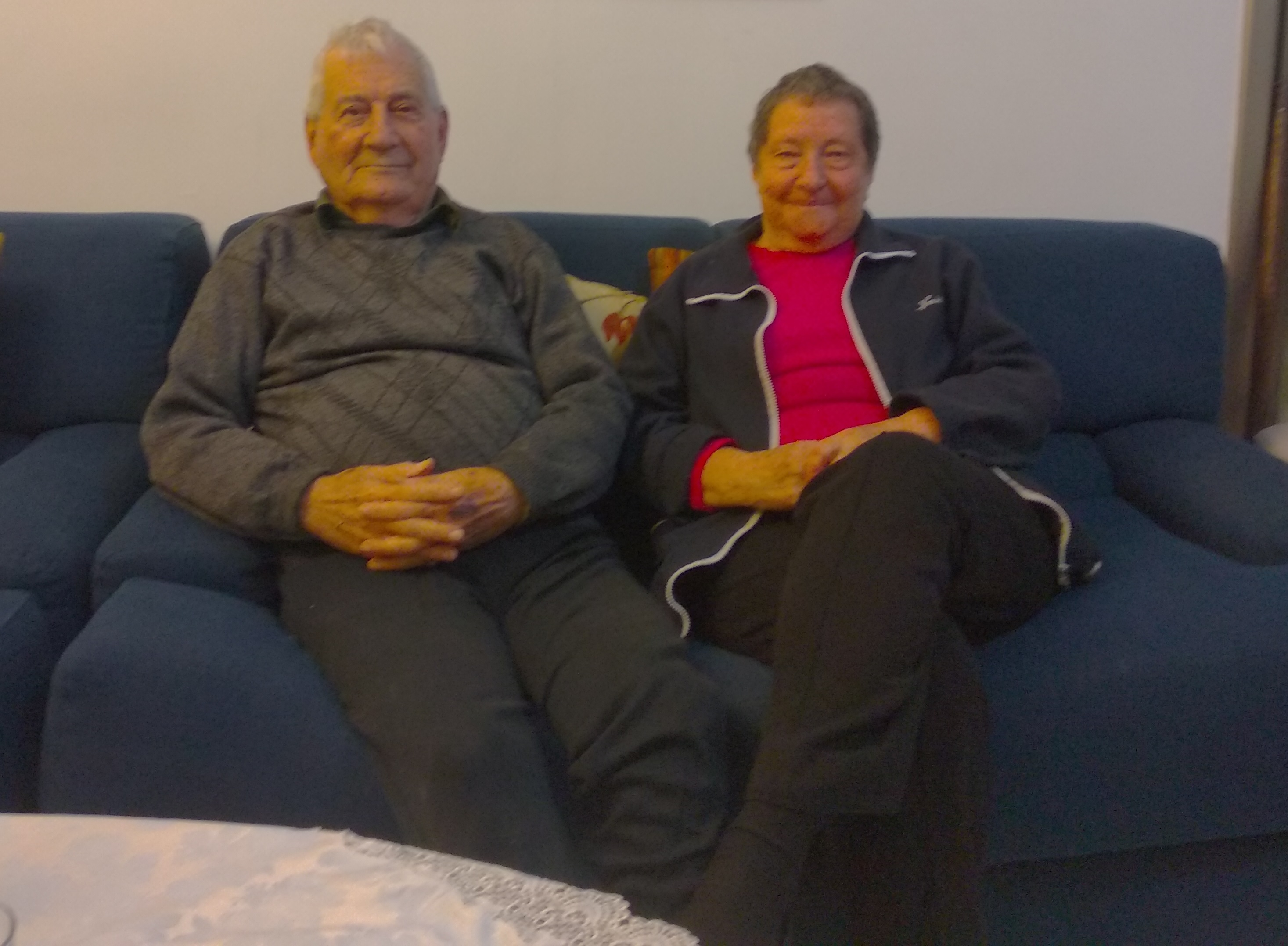 לאה ומרדכי נאור, דצמבר 2019